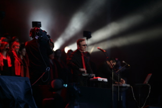 Concert de Marboss à Louvigny pour l'inauguration de la Gare TGV Lorraine